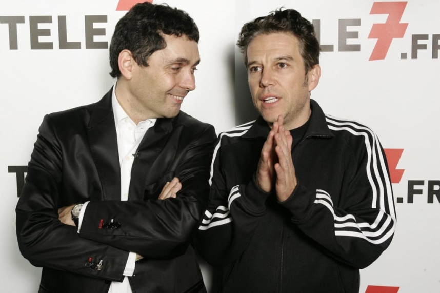 Thierry Moreau (Rédacteur en chef de Télé 7 Jours) et Phillippe Vandel (chronique de l'émission Touche pas à mon poste sur D8) lors de la soirée I Love TV organisée par le programme tv Télé 7 Jours.